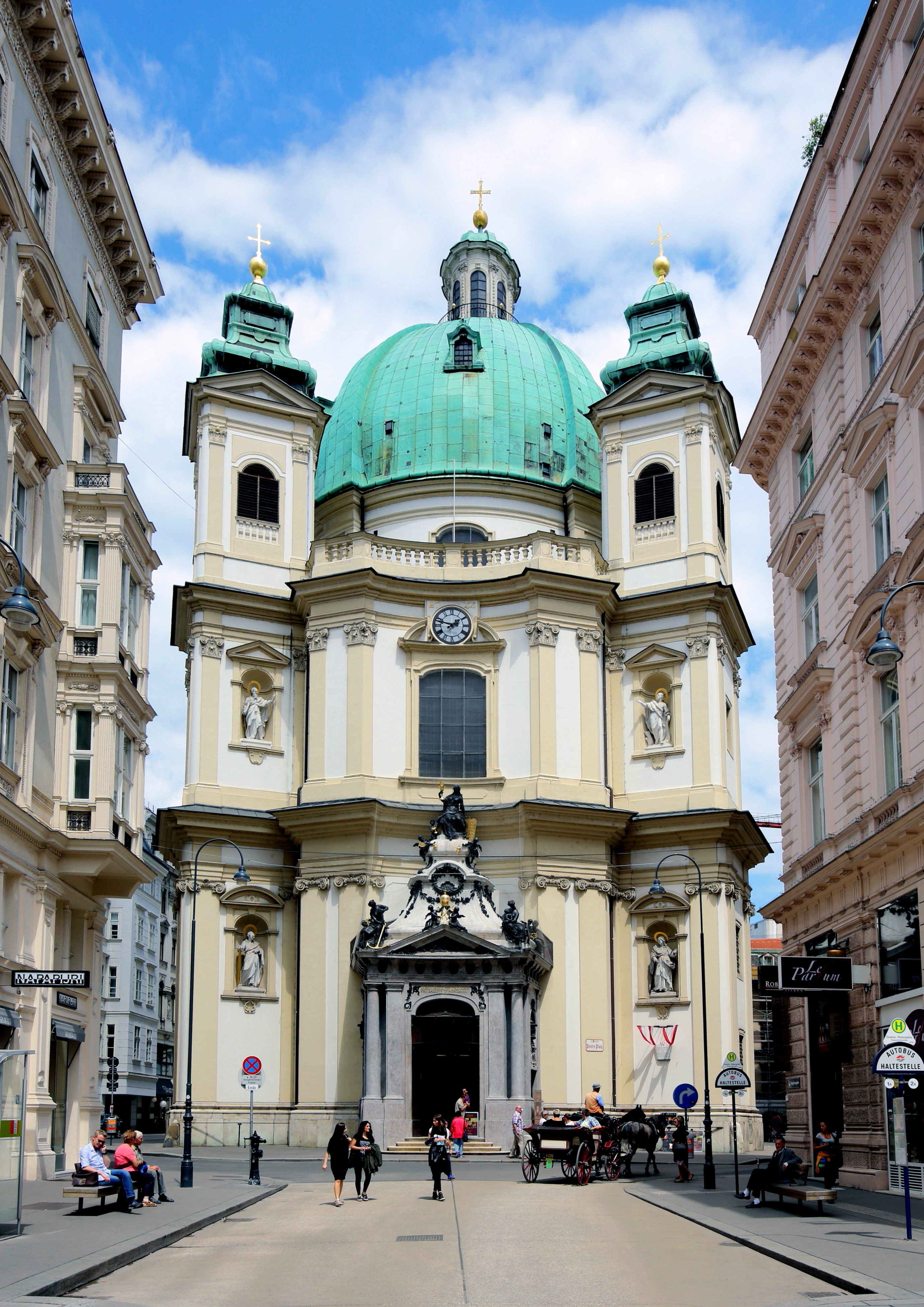 Die Hauptfassade bzw. Südwestansicht der Peterskirche im 1. Wiener Gemeindebezirk Innere Stadt. Der erste Kuppelbau des barocken Wien wurde ab 1701/02 errichtet. Die Planung und der Baubeginn (Fundamente) erfolgte unter Gabriele Montani. Nachdem dieser als Festungsarchitekt nach Madrid zog, setzte ab 1703 sehr wahrscheinlich Johann Lucas von Hildebrandt den Bau nach veränderten Plänen fort.